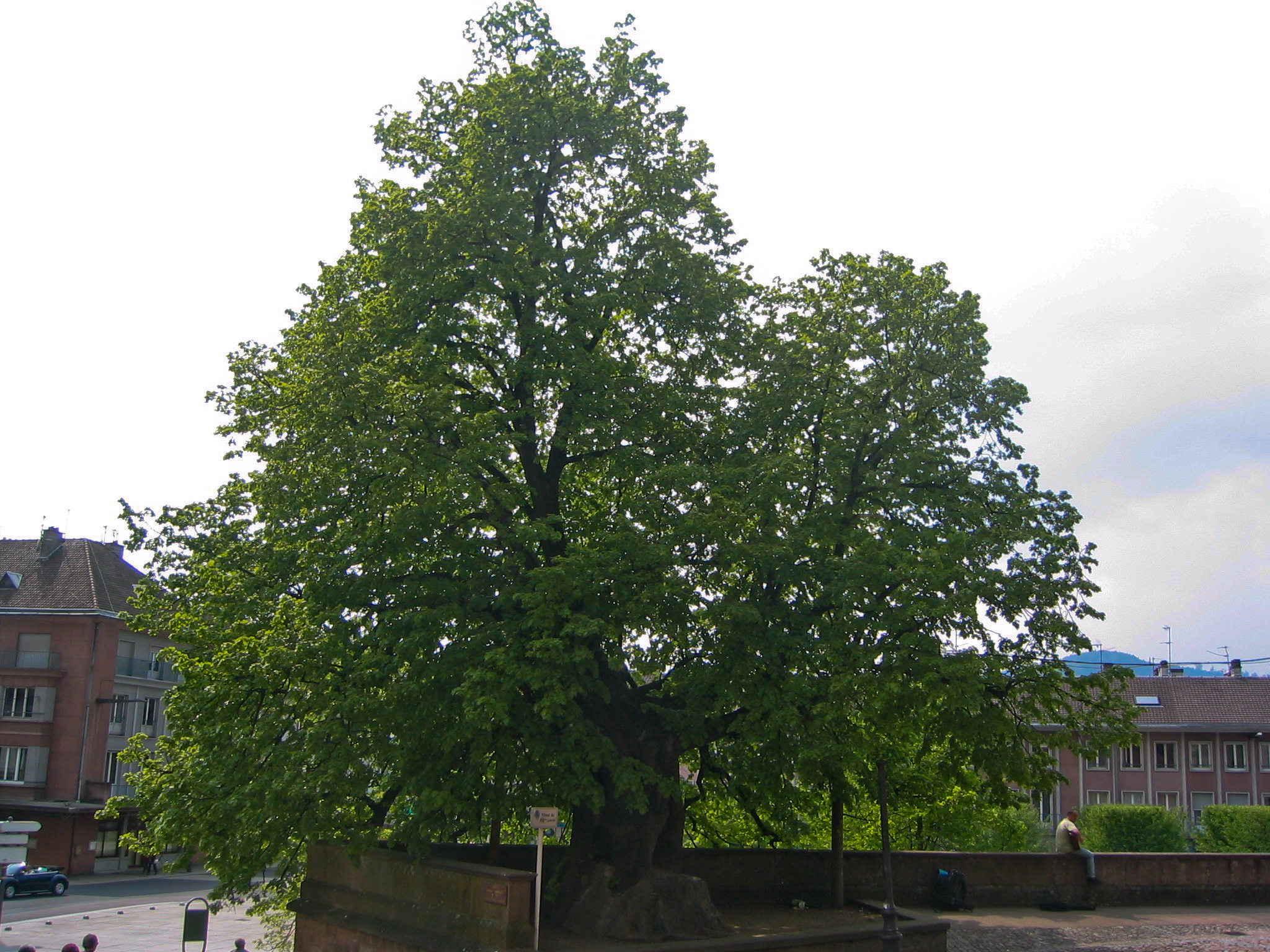 Cathédrale de Saint-Dié-des-Vosges, tilleul du 13ème siècle.